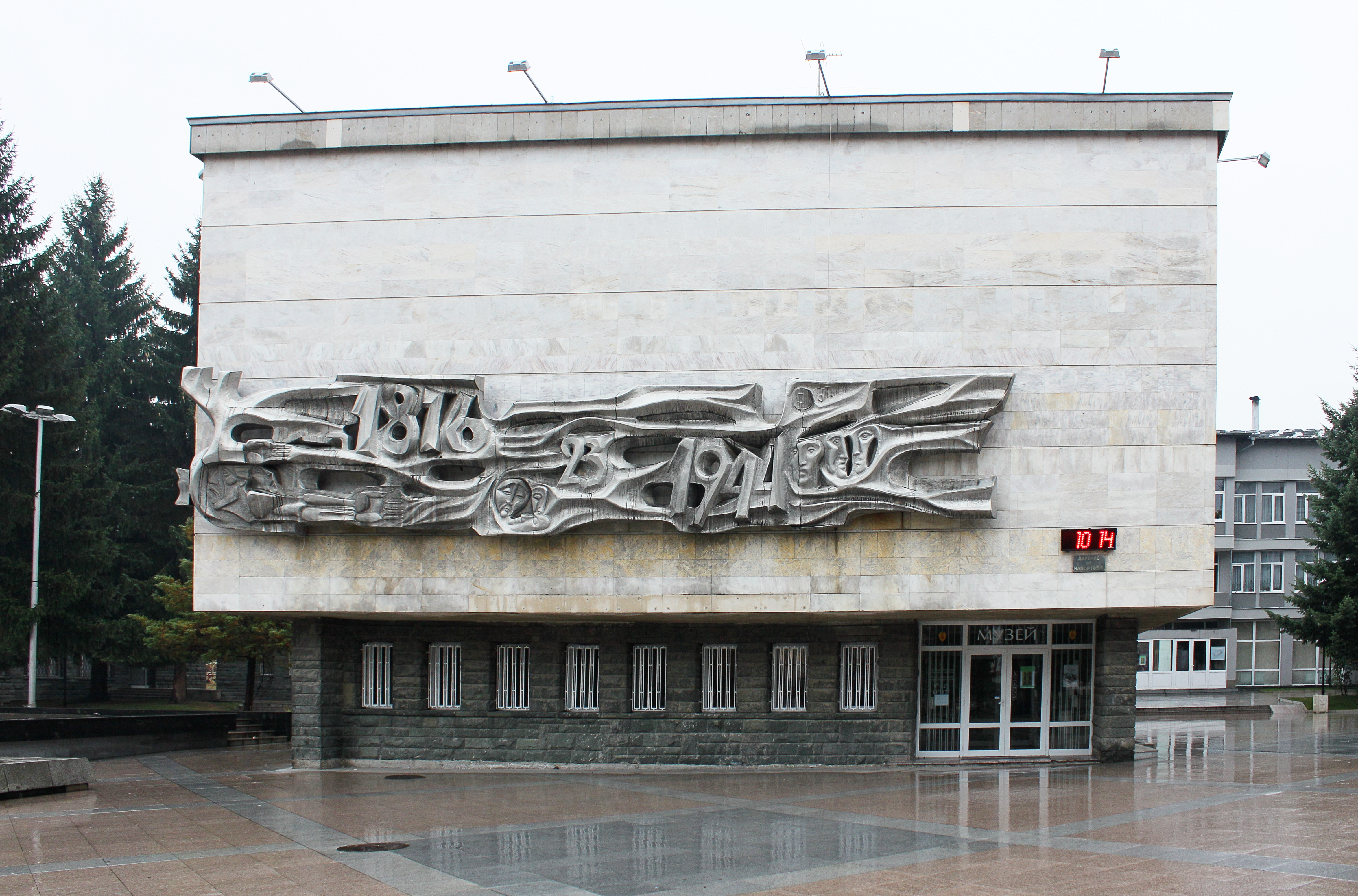 Batak, Bulgarien